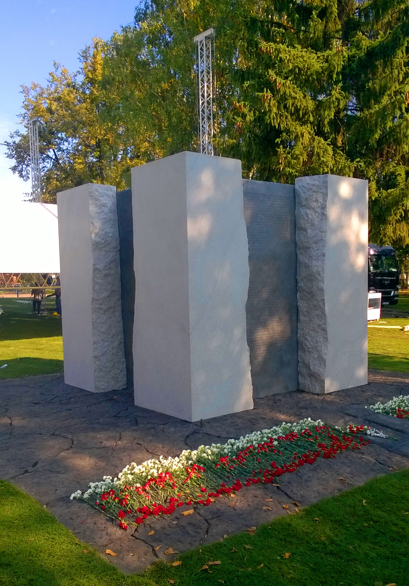 Pomnik Ofiar Zbrodni Pomorskiej 1939 w Toruniu2